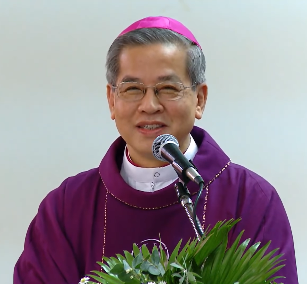 TGM Giuse Nguyễn Năng giảng trong lễ giỗ TGM PhaoLô Nguyễn Văn Bình ngày 01/07/2020